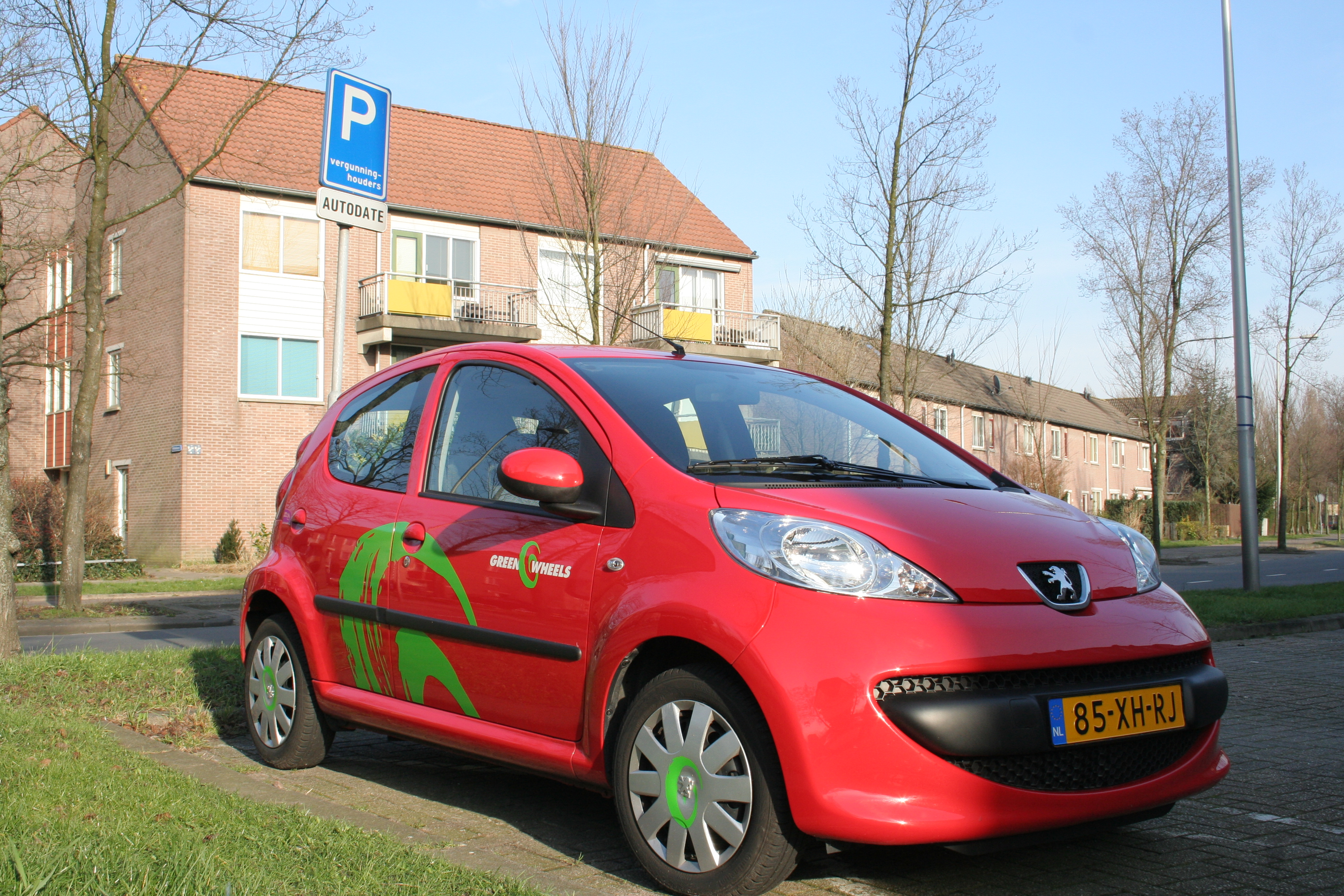 Greenwheels carshare deelauto